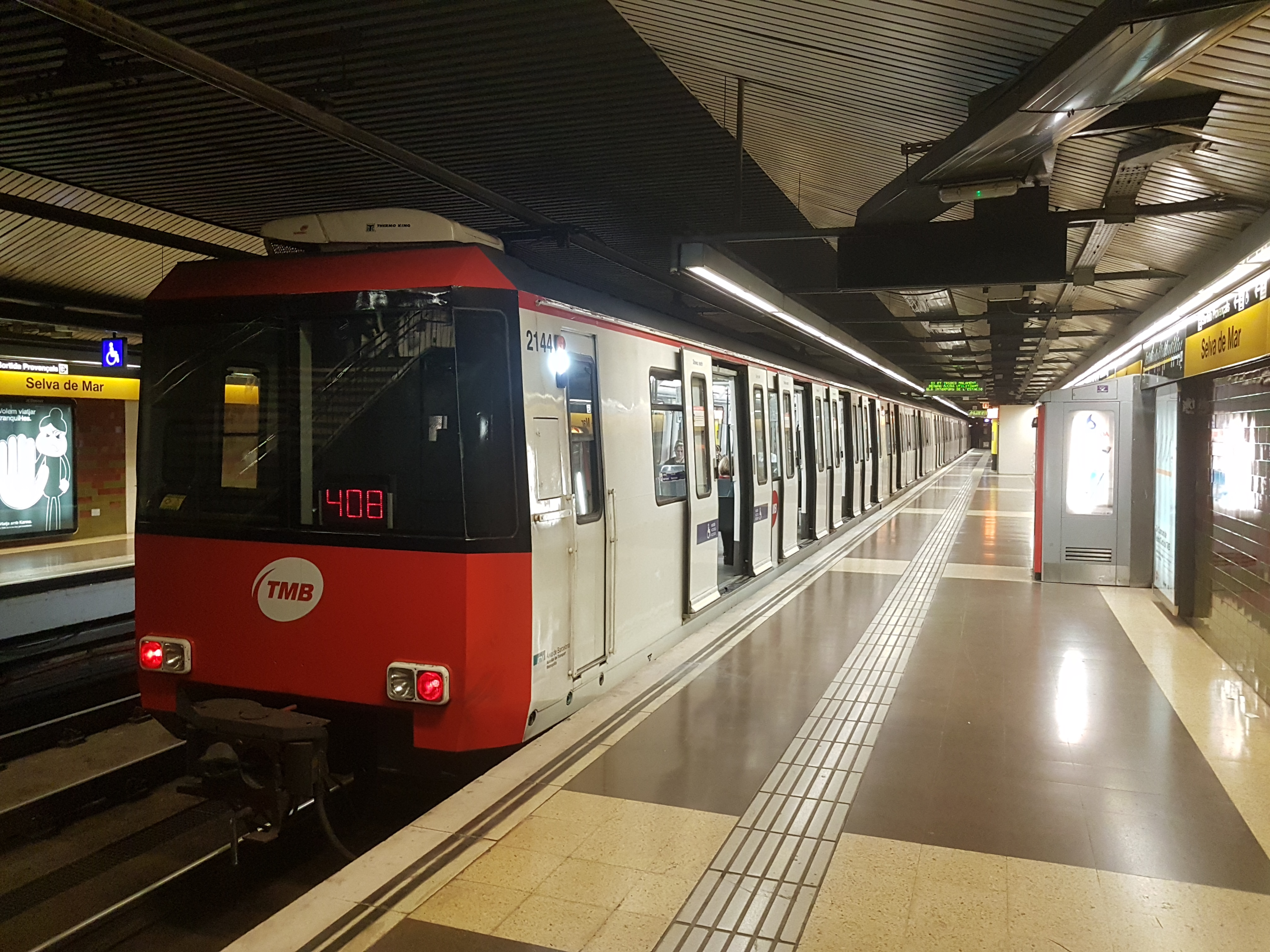 Unitat 2100 a l'estació de metro Selva de Mar de la L4 del metro de Barcelona dirección Trinitat Nova